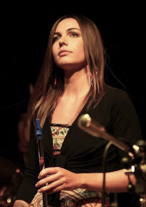 Foto scattata da Marco Maui